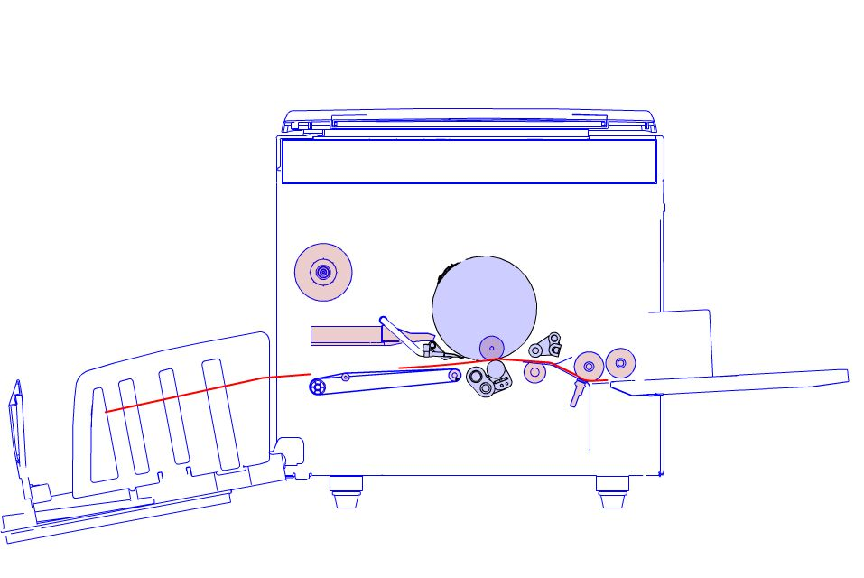 Priečny rez Risografu